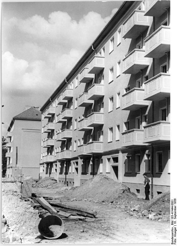 Berlin, Schwedter Straße, Neubauten, Wohnblocks Zentralbild Krueger Krue-Sch. 18.9.1956 Die Gerüste auf der Baustelle Schwedter Strasse sind gefallen In dieser Woche sind die ersten Gerüste auf der Baustelle Schwedter Strasse im Berliner Stadtbezirk Prenzlauer Berg gefallen. Damit steht ein weiteres Wohnungsbauprojekt kurz vor der Vollendung. UBz: Blick auf die neuen Wohnhäuser in der Schwedter Strasse.